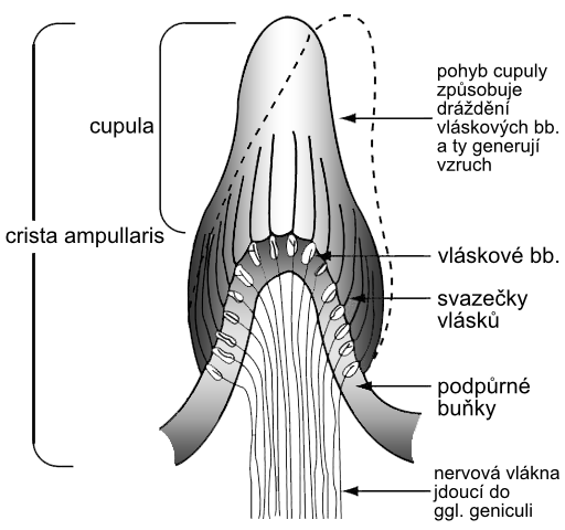 Při rotaci hlavy se pohyb endolymfy v polokružných kanálcích přenáší na kupuly ampulárních krist. Vychýlení kupuly vede k pohybu vlásků, a tím k podráždění vláskových buněk.